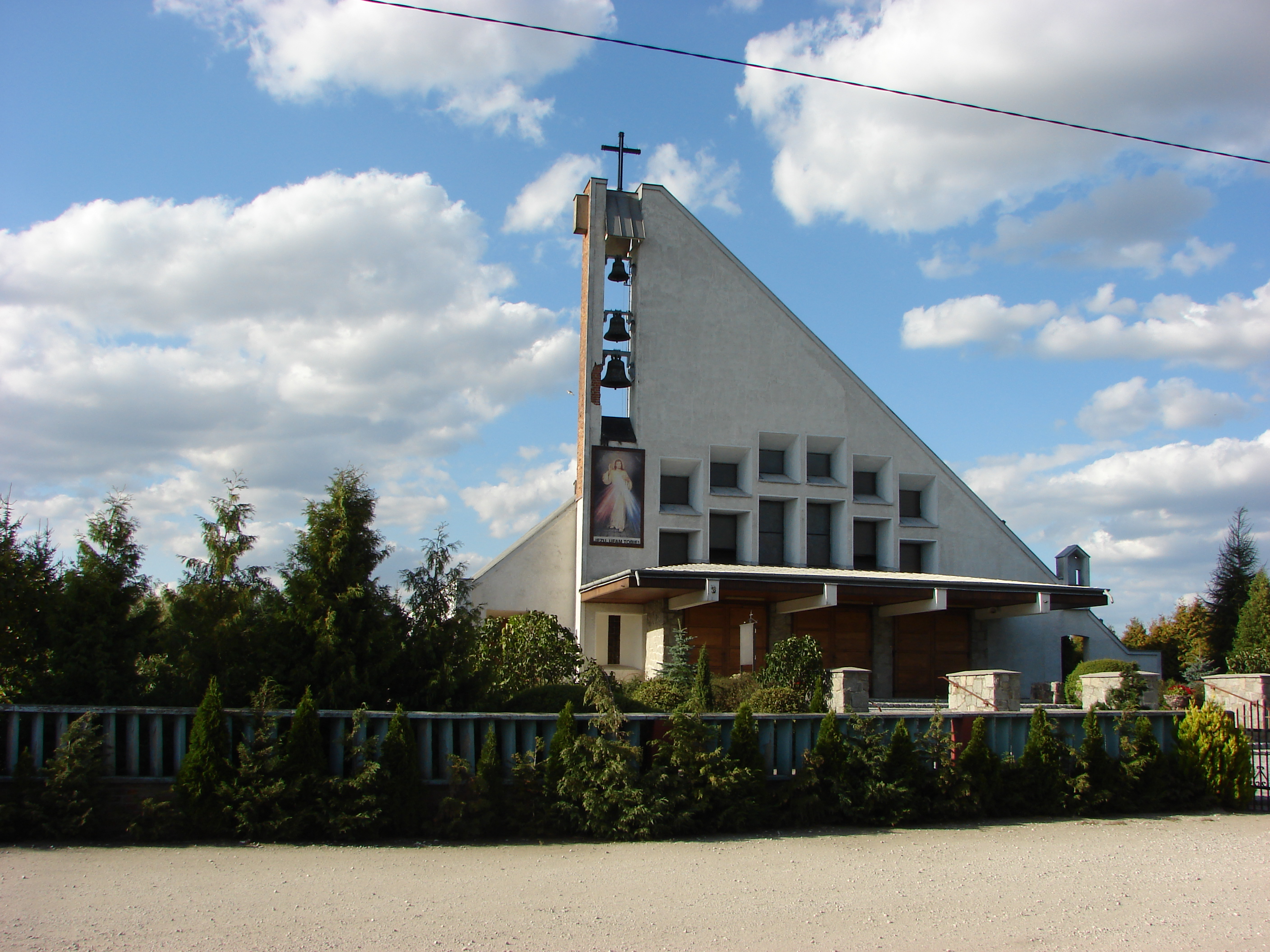 Cetty, Gmina Chodecz.